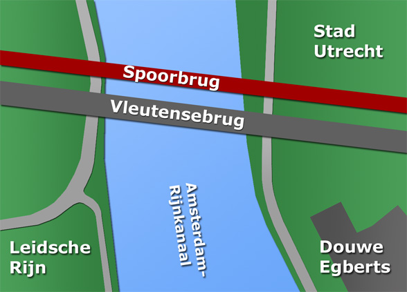 Situatieoverzicht vervanging Vleutensebrug door Hogeweidebrug